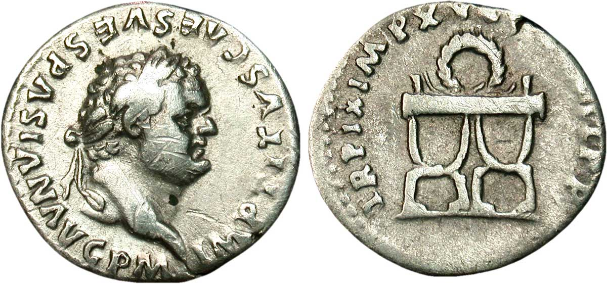 Denier à l'effigie de Titus Date : 80 Description revers : Chaise curule surmontée d’une couronne . Traduction revers : “Tribunicia Potestas nonus Imperator quintus decimus Consul octavus Pater Patriæ”, (Revêtu de la neuvième puissance tribunitienne de la quinzième salutation impériale consul pour la huitième fois père de la patrie) .